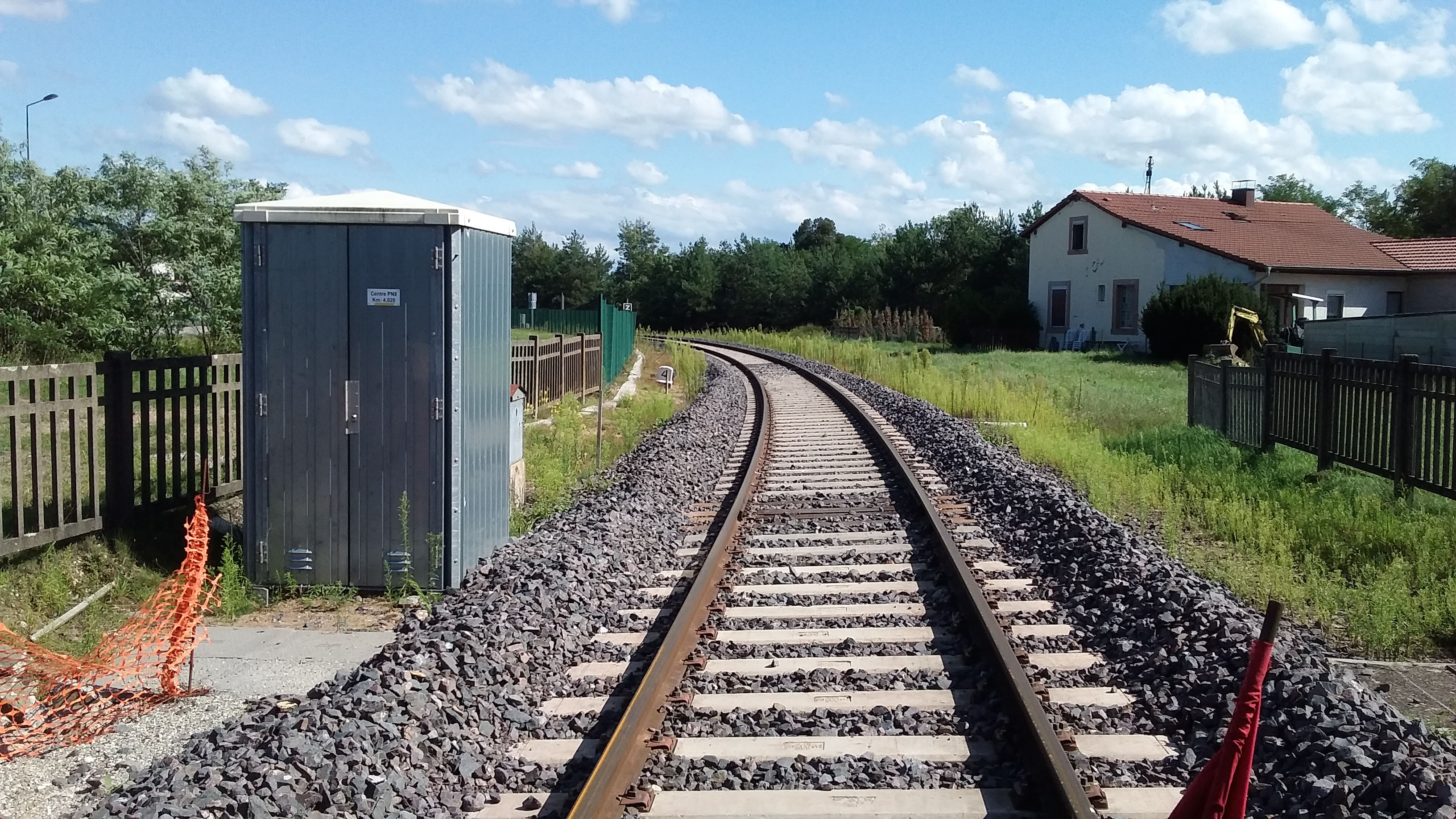 Vue des voies de la ligne Haguenau à Hagarten-Falck, vue aux alentours de Schweighouse-sur-Moder